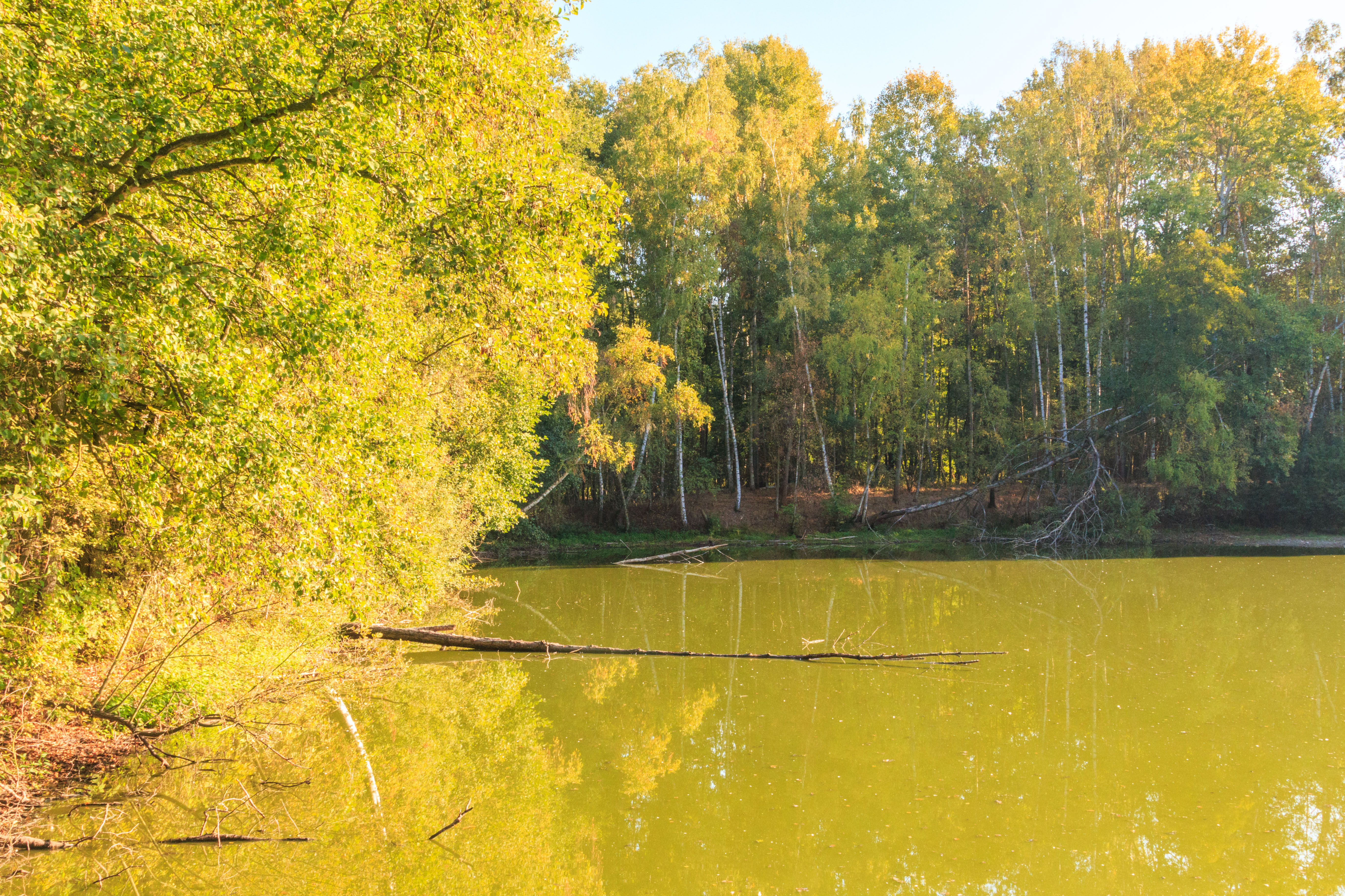 Rybník pod mimoňským koupalištěm Project: Vodstvo.